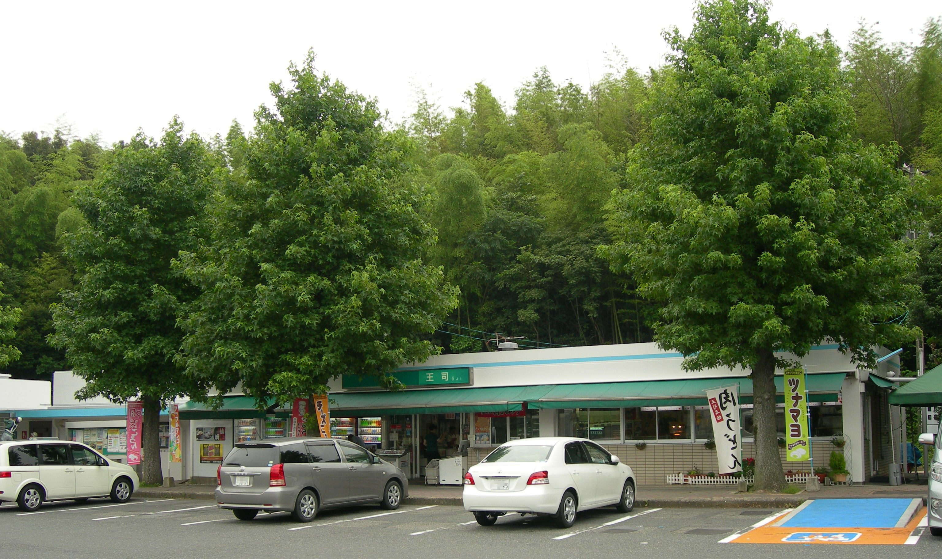 中国自動車道 王司パーキングエリア（下関方面）施設